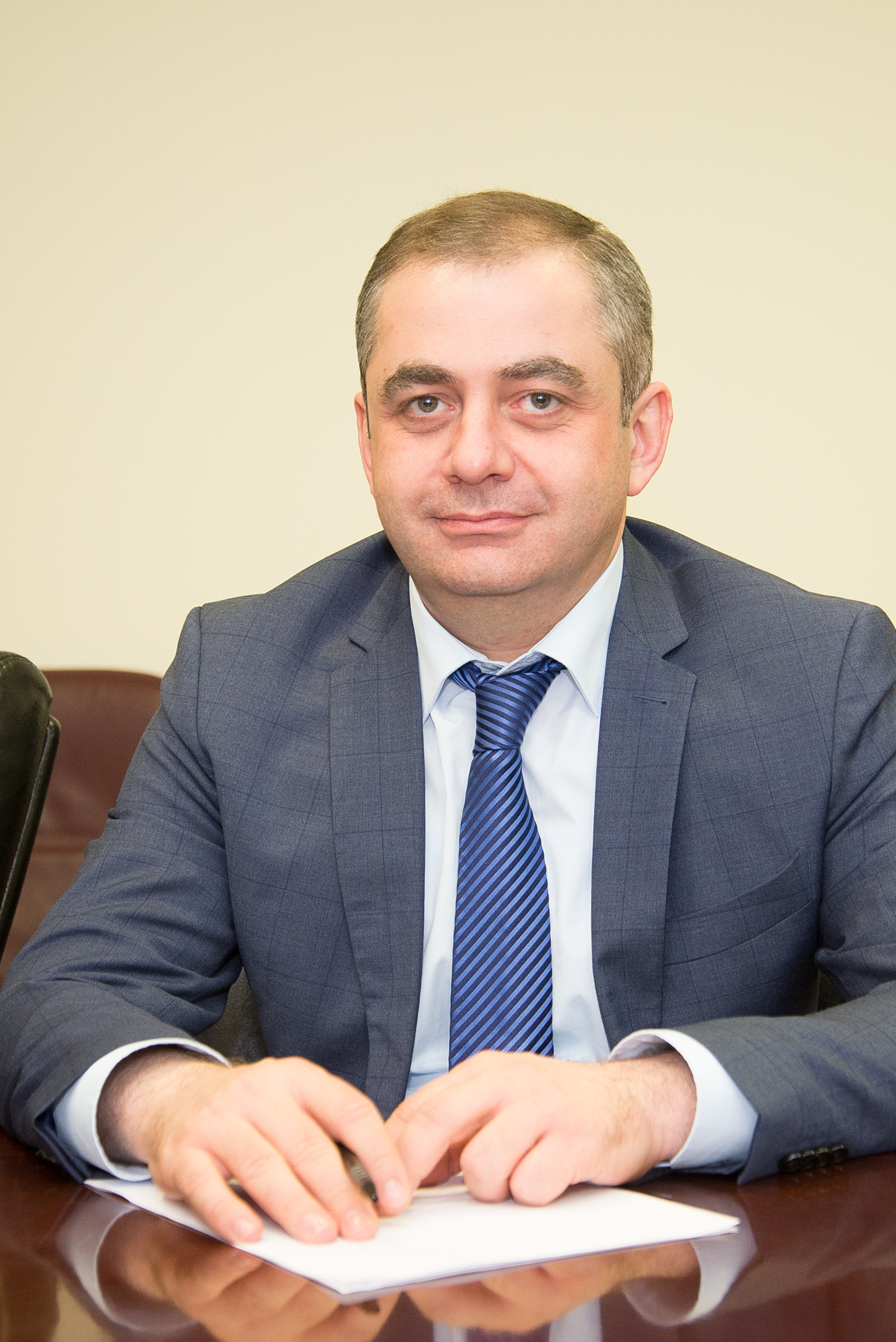 Заместитель директора НАБУ Гизо Углава